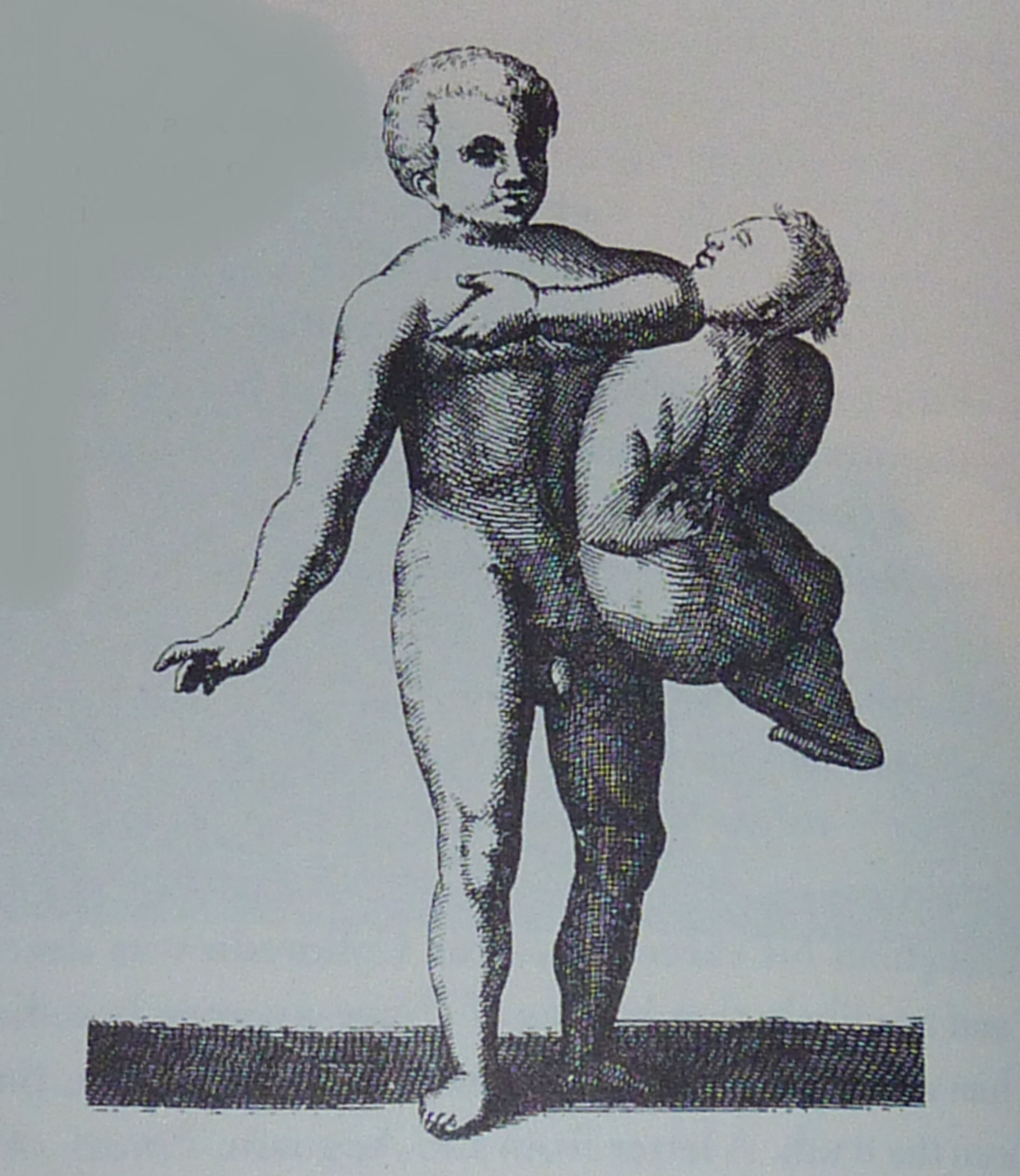 Fortunio Licetis Darstellung von Lazarus und Joannes Baptista Colloredo in De Monstris, 1665